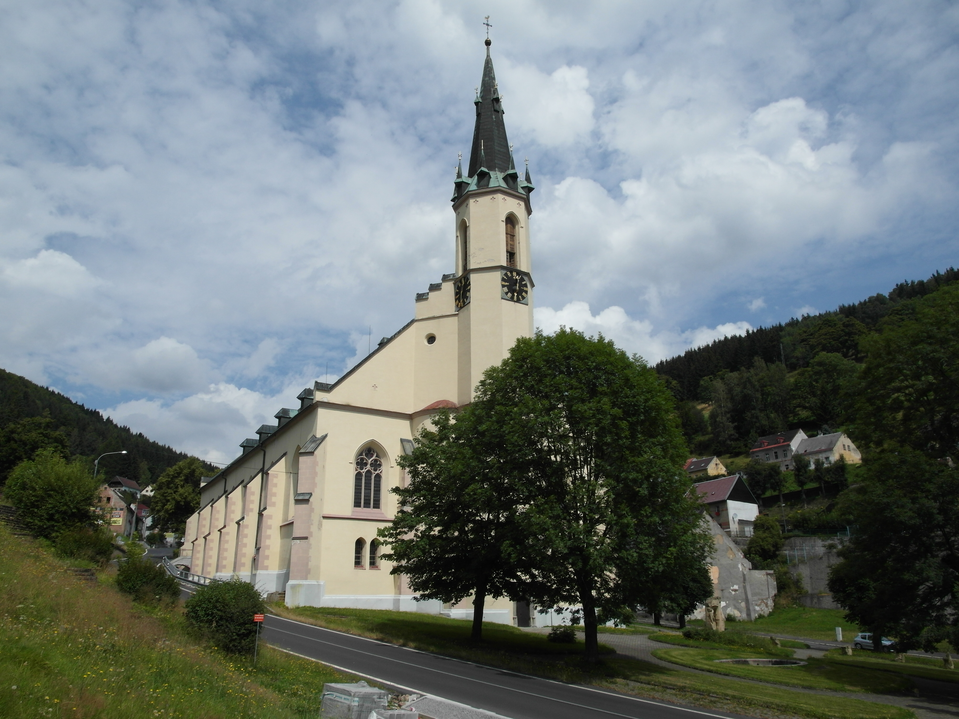 pozdně gotický děkanský kostel sv. Jáchyma (Jáchymov)